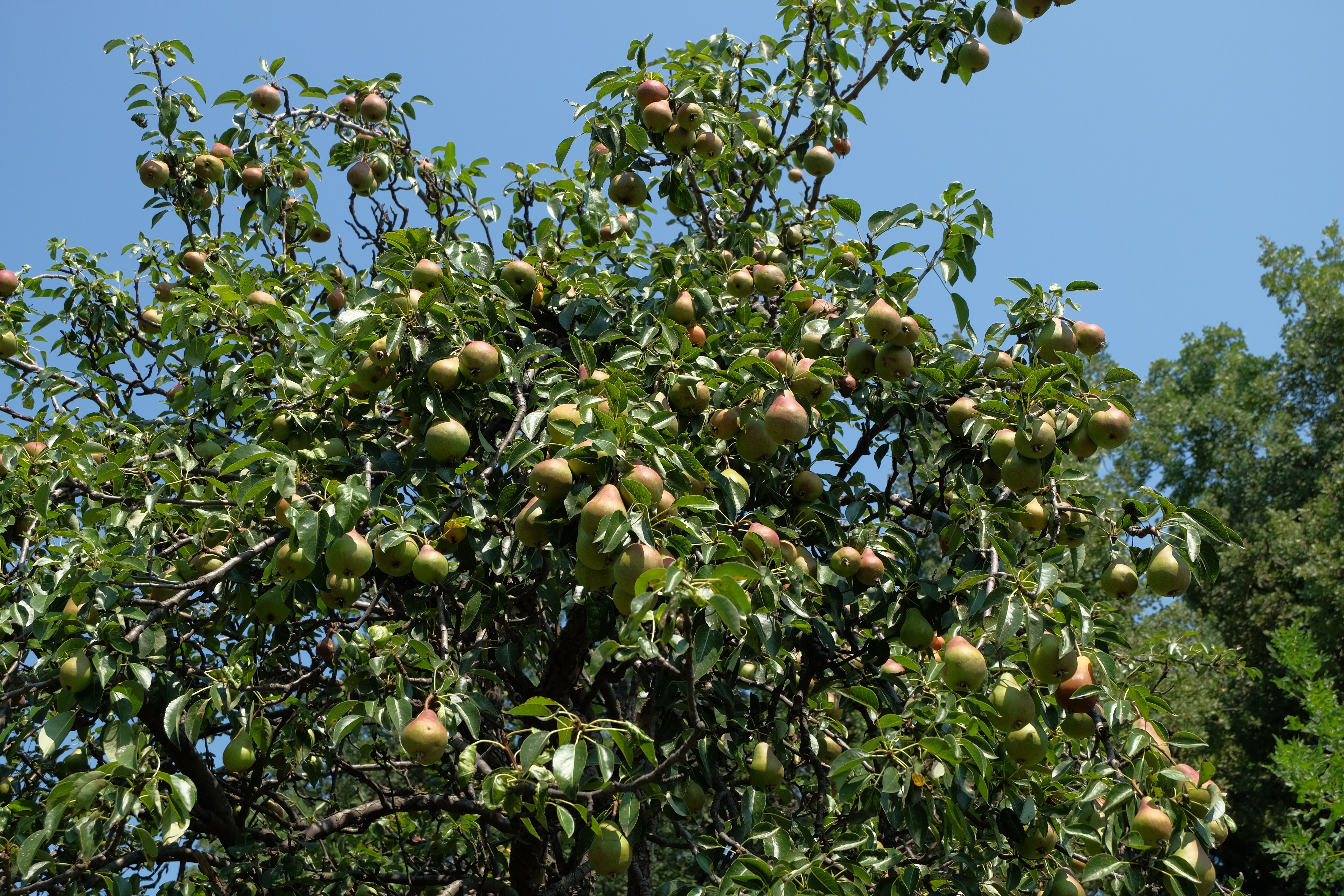 Дерево с плодами Pyrus communis